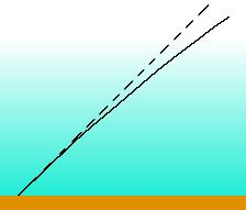 Schema atmosféricke refrakce.